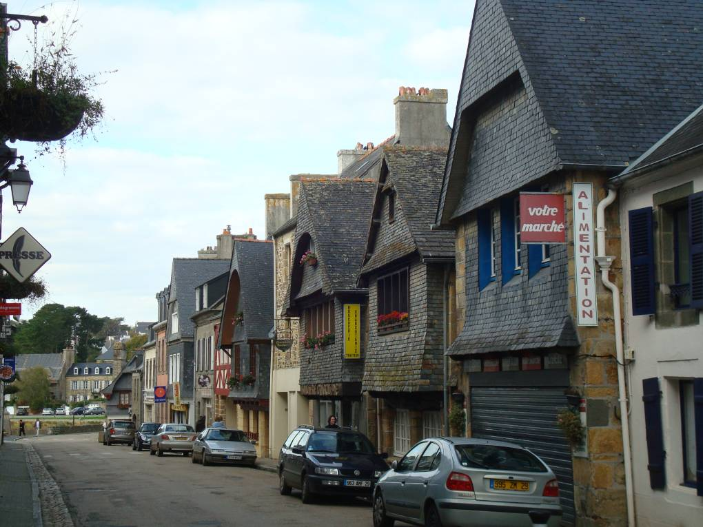 Les maisons de bois dans la rue principale à Le Faou, Finistère, France